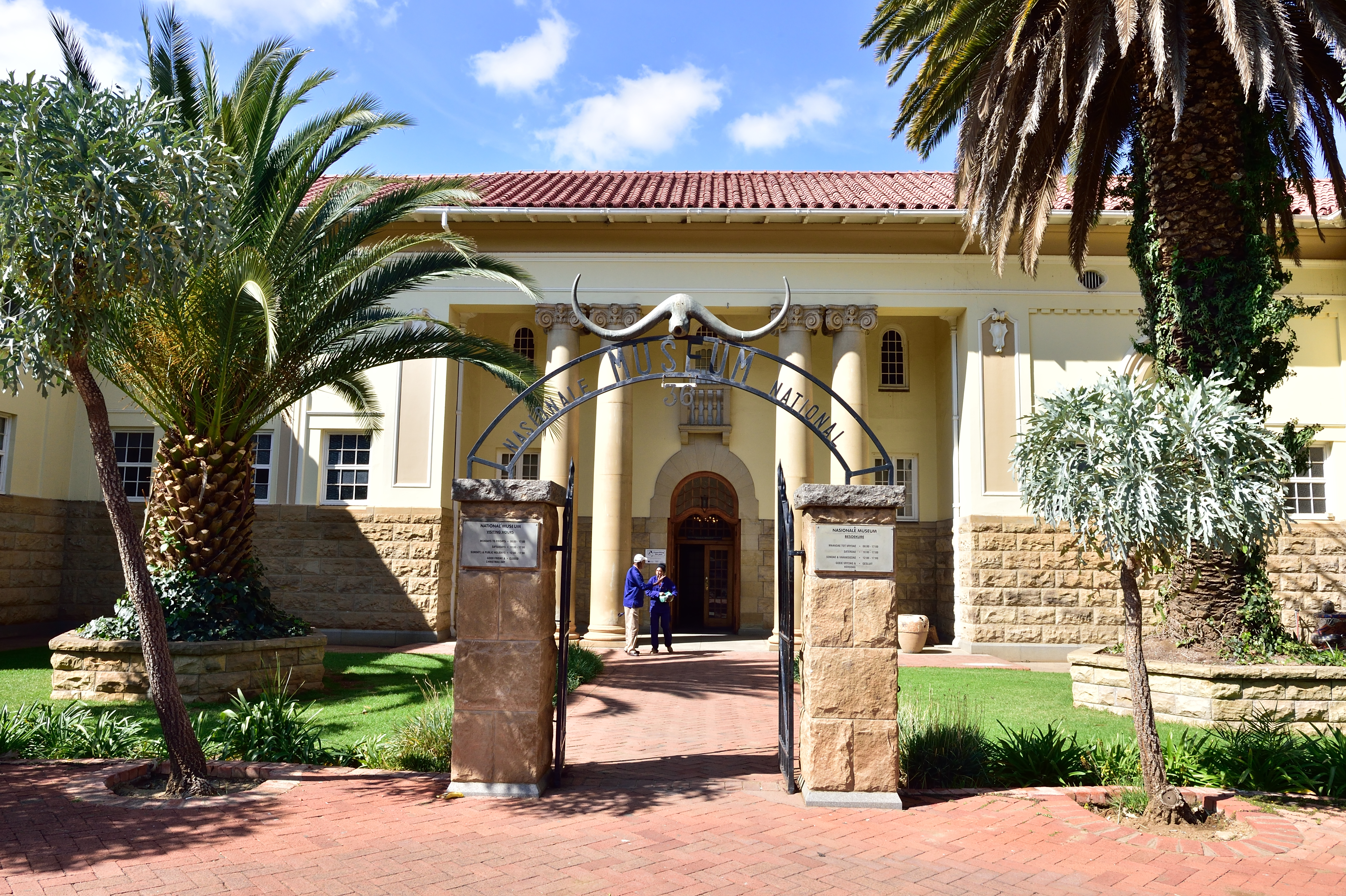 Vue du Free State en Afrique du Sud.